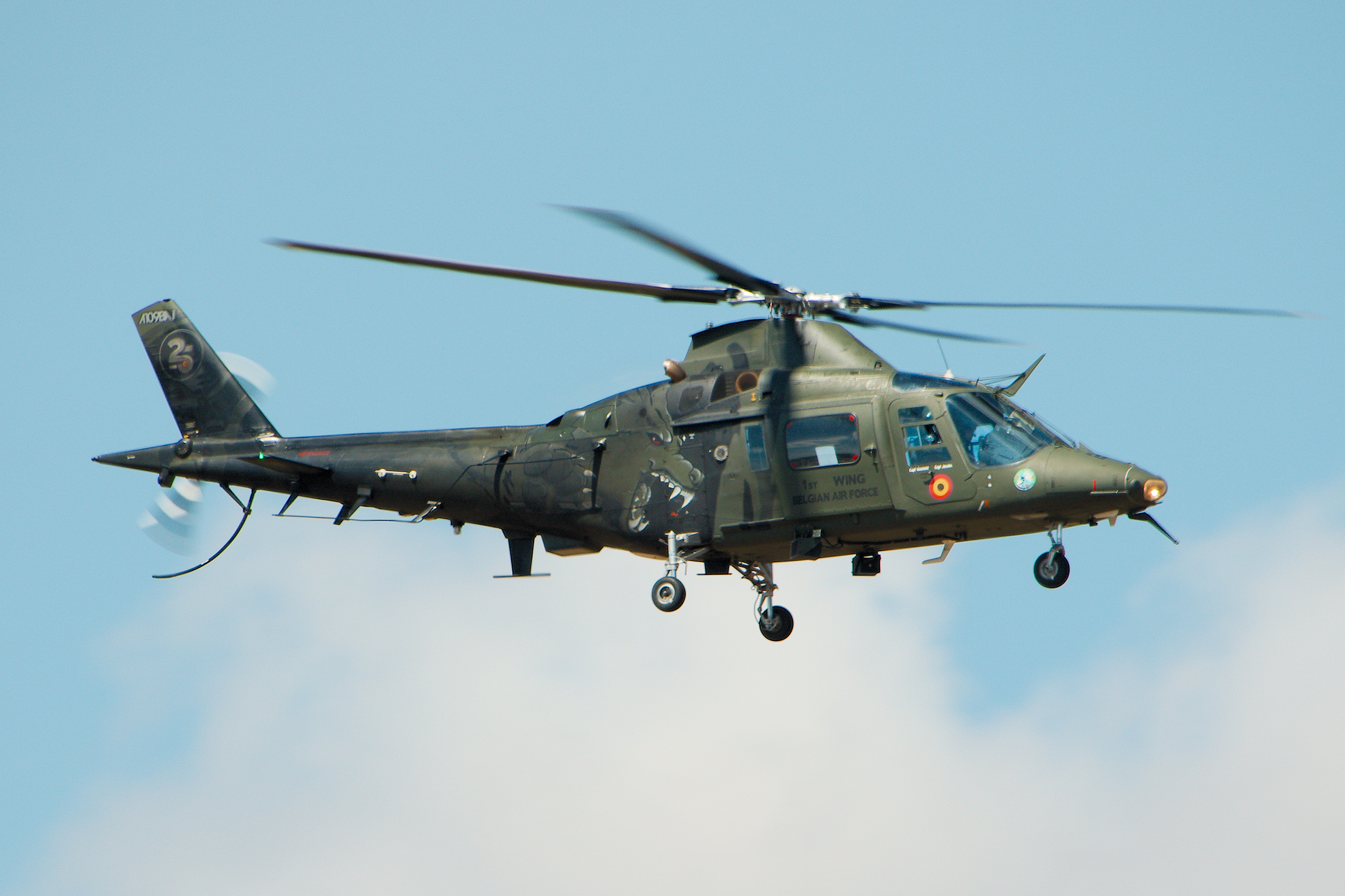 A109 - RIAT 2018